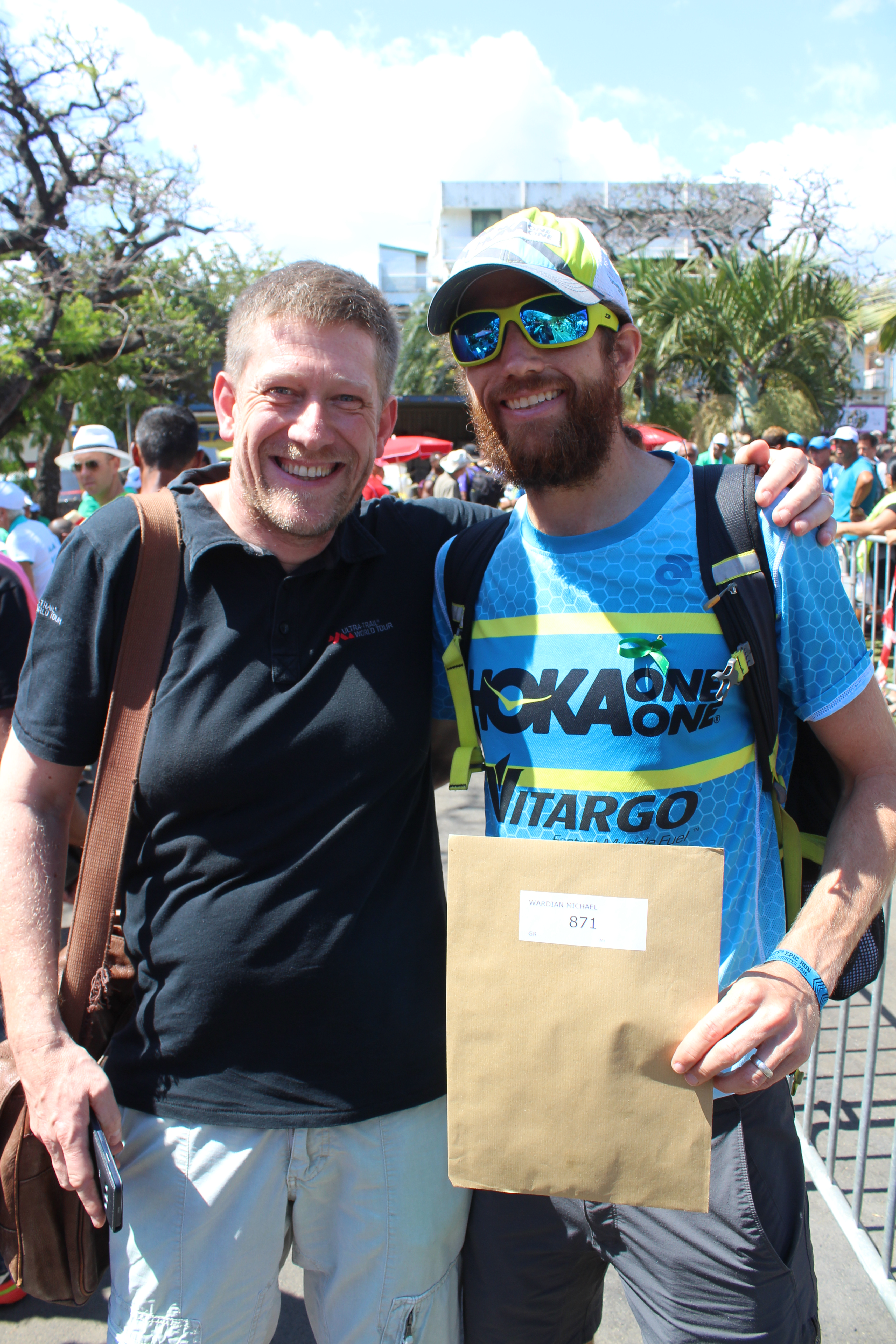 Michael Wardian (à droite) et Jean-Charles Perrin de l'Ultra-Trail World Tour (à gauche) lors de la remise des dossards du Grand Raid 2015 à Saint-Pierre de La Réunion.